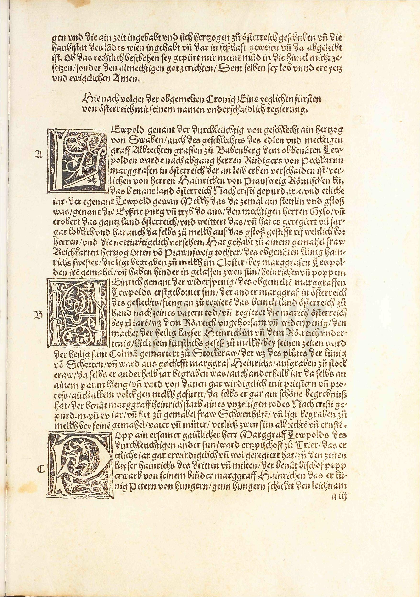 Ladislaus Sunthaym: Der löblichen Fürsten und des Landes Österreich Altherkommen und Regierung Printed by Michael Furter in Basel, not before 1491